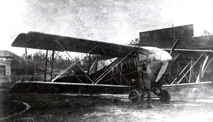 Пассажирский самолёт ГАЗ №5 во время испытаний летом 1924 года